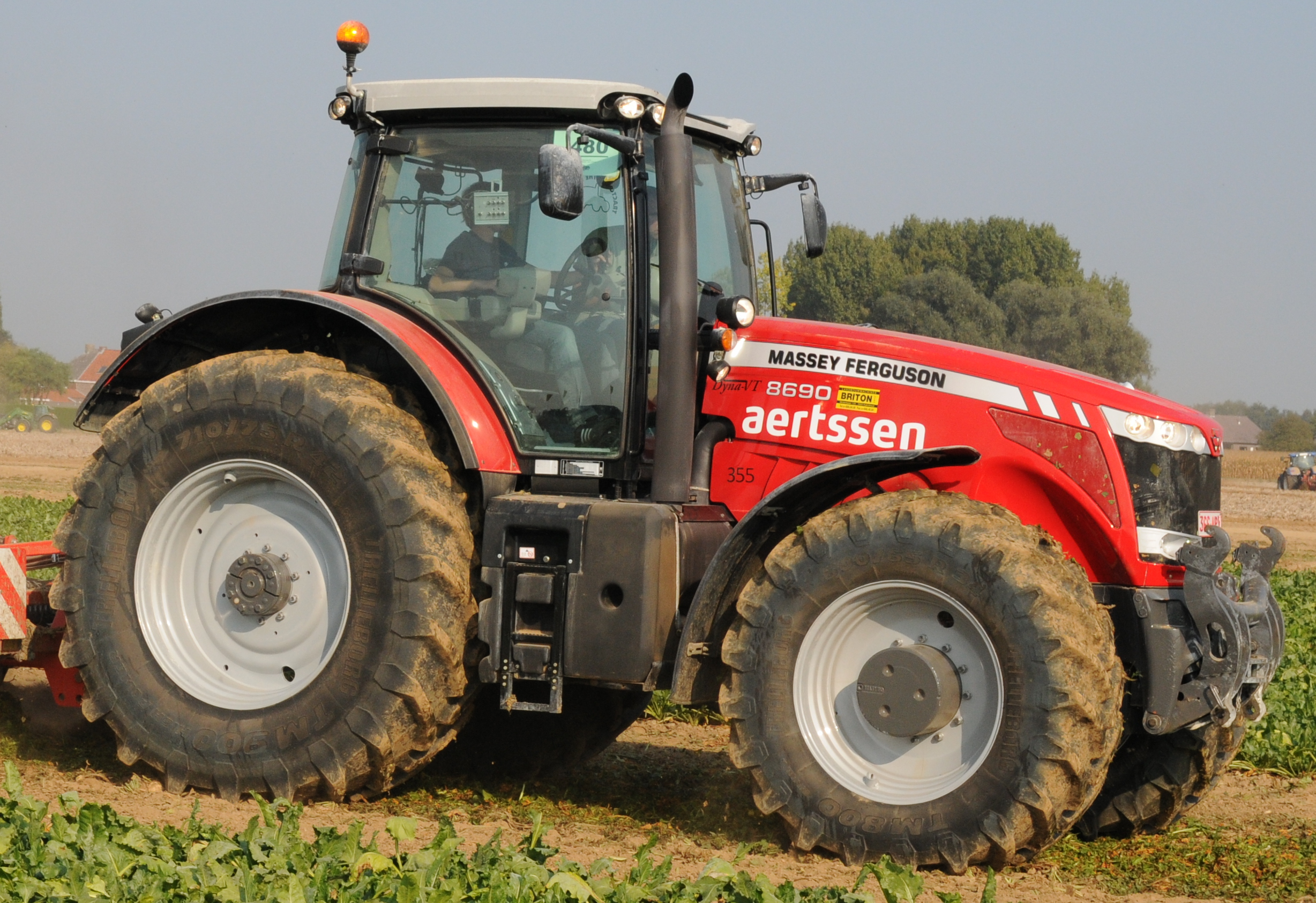 Massey Ferguson 8690, Werktuigendagen 2009